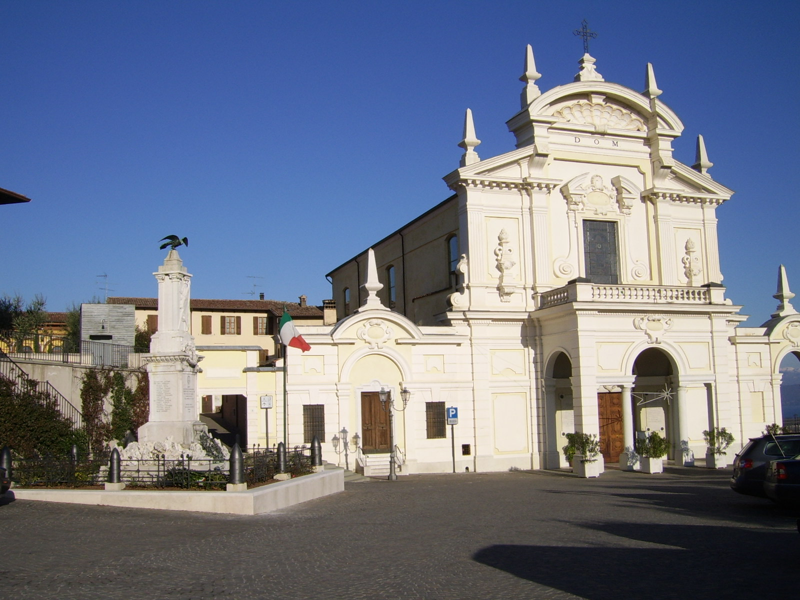 Chiesa parrocchiale di Polpenazze, dedicata alla Natività di Maria Vergine.